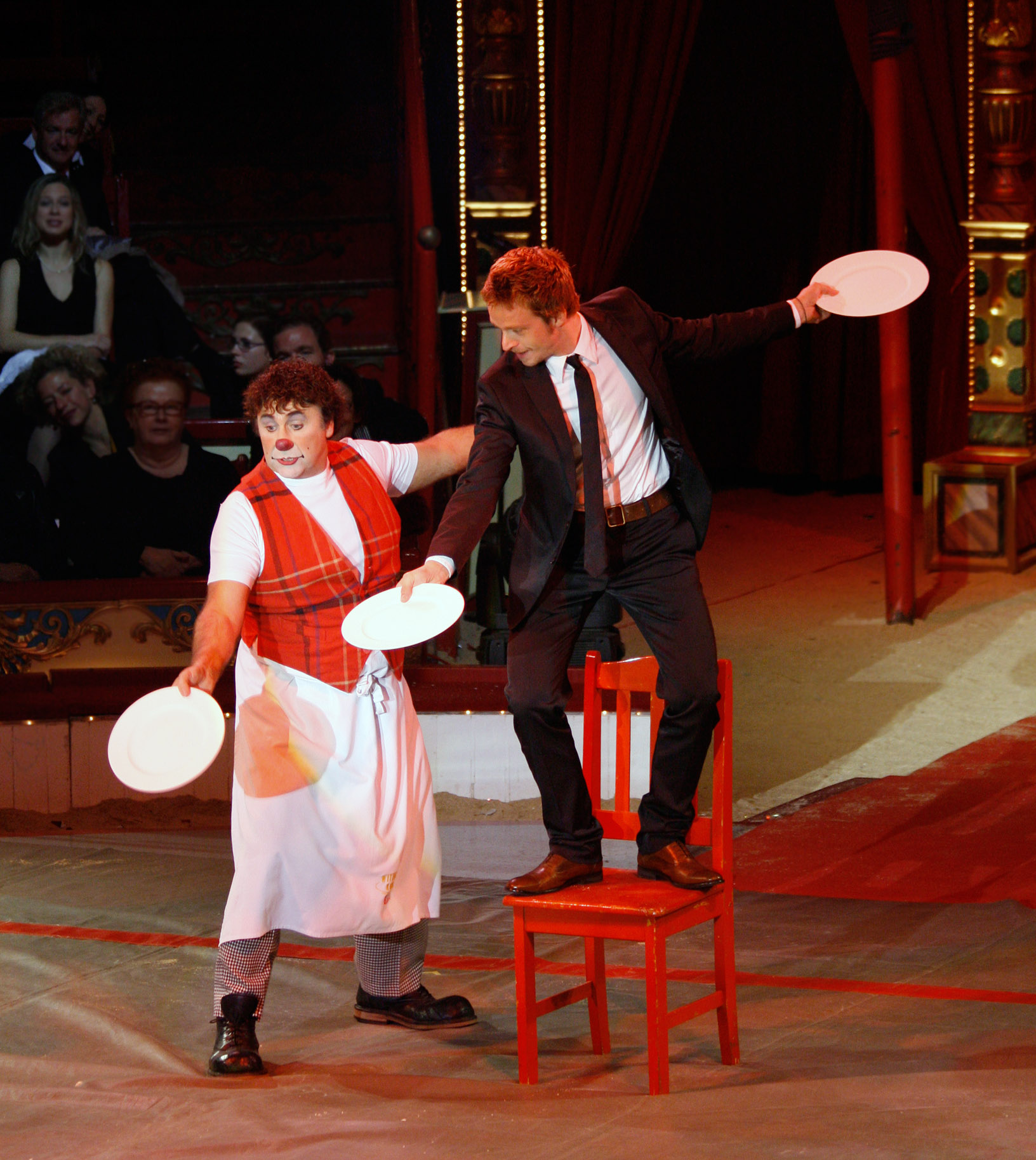 Verleihung des Nestroy-Theaterpreises 2009: Claudius von Stolzmann und David Larible (Circus Roncalli auf dem Wiener Rathausplatz).